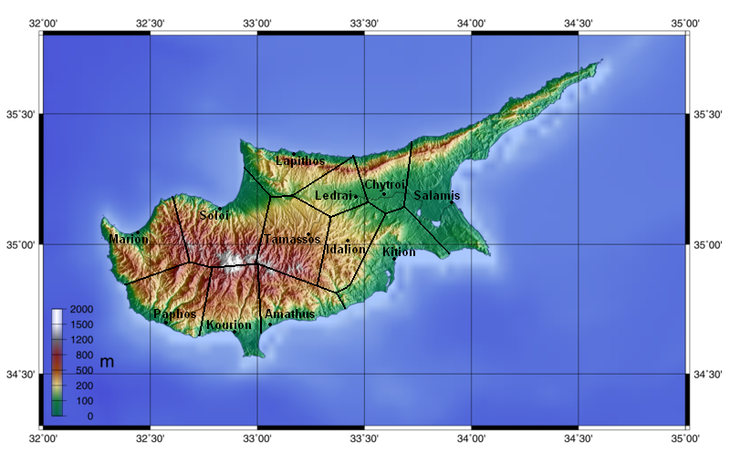 Kaart van Cyprus met een sumiere aanduiding van de voornaamste Chypriotische stadskoninkrijken.